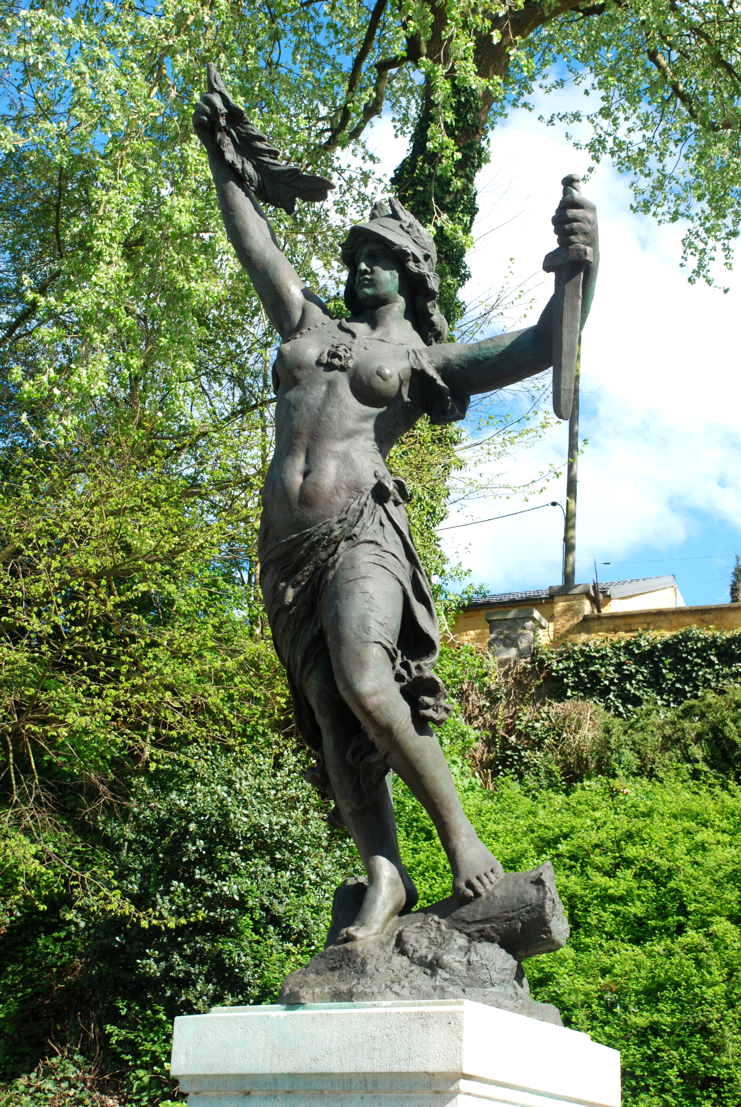 Belgique - Brabant wallon - Monument aux Morts de Court-Saint-Étienne